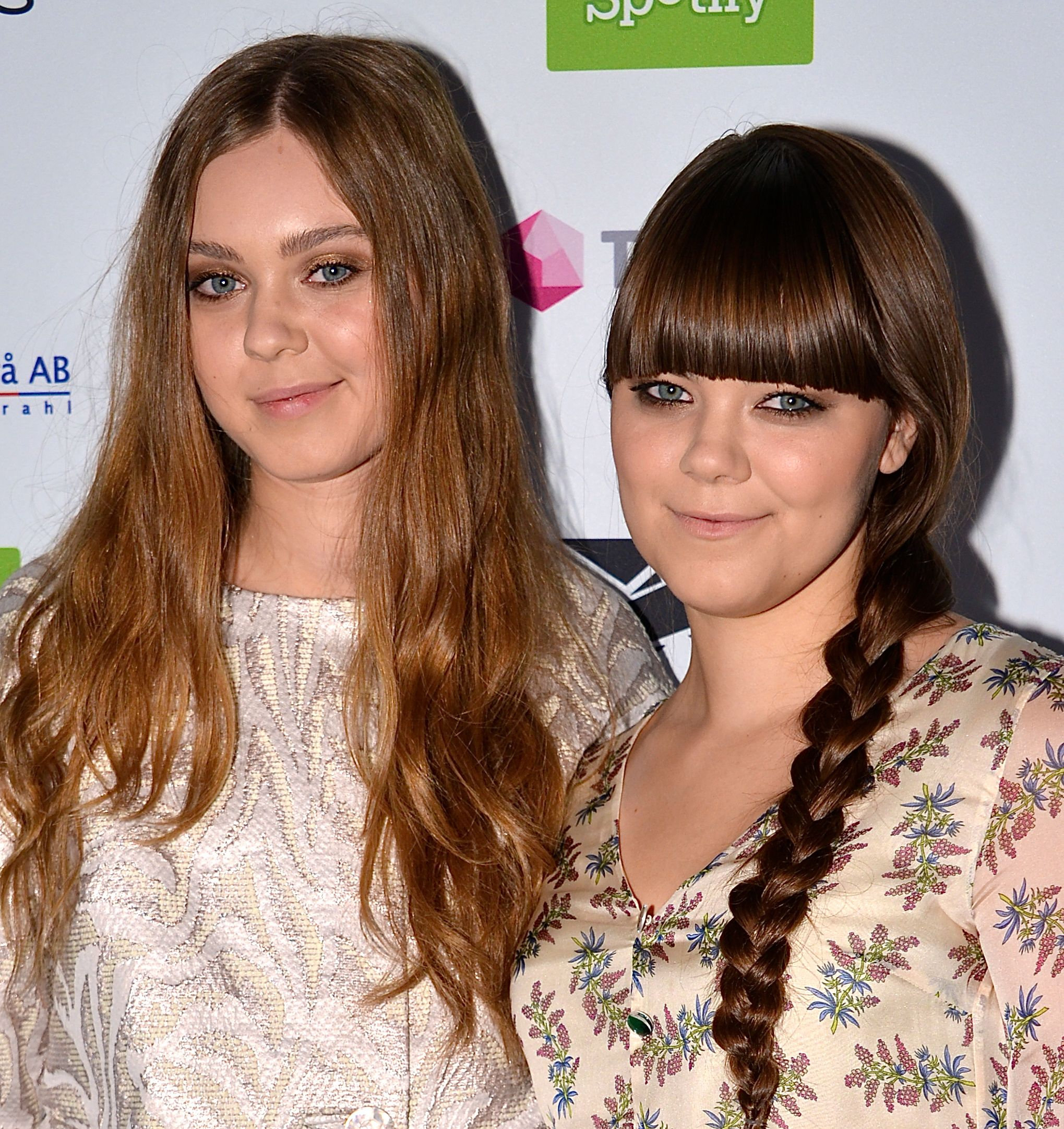 First Aid Kit på Grammisgalan på Cirkus, Stockholm den 20 februari 2013.